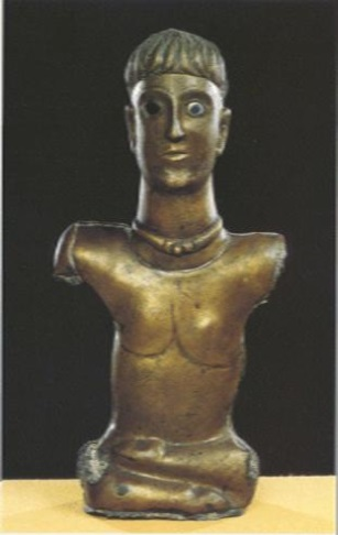 Généralement daté du 1er siècle avant JC, il se nomme Cernunnos. Il symbolise la renaissance, le renouveau de la nature et l’abondance. C’est une statuette en bronze de 42 cm de hauteur, découverte en 1815 dans le parc du château de Mesnil-Voysin, en draguant la Juine. Entreposée dans un placard de la lingerie de la marquise de Rouge, puis oubliée, elle fut redécouverte en 1911. Le musée des antiquités nationales de Saint-Germain-en-Laye possède aujourd'hui l'original depuis 1934 et une copie est exposée dans la salle du Conseil Municipal en Mairie de Bouray-sur-Juine. Le personnage est assis les jambes repliées, dans la pose dite bouddhique, imberbe, nu, le cou orné du torque gaulois (collier en fil de laiton ou de fer, roulé en cercle), parure aristocratique. Le torque fermé est un symbole de divinité. Le torse est disproportionné. Les membres inférieurs qui paraissent atrophiés sont des pattes de cerf avec leurs sabots, intégrant à l’homme les attributs symboliques de l’animal sacré. La tête avec sa chevelure en mèches, à la gauloise, en bronze coulé, l'œil en émail témoignent de l’habileté des artisans gaulois. La tête est admirablement traitée, à la fois juste d’allure et de proportions, belle dans son expression figée, grave, hautaine.